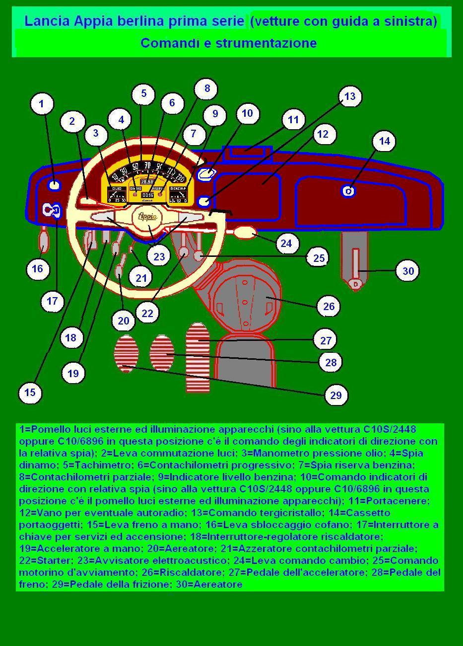 Immagine-disegno eseguito "autonomamente" dal sottoscritto (Giomayo) con il programma "Paint" di Windows ispirandosi (e traendo le informazioni) da quanto pubblicato a pagina 9 dello stampato edito dalla Lancia nell'ottobre 1957 (stampato n. 001134, ristampa del X/57)